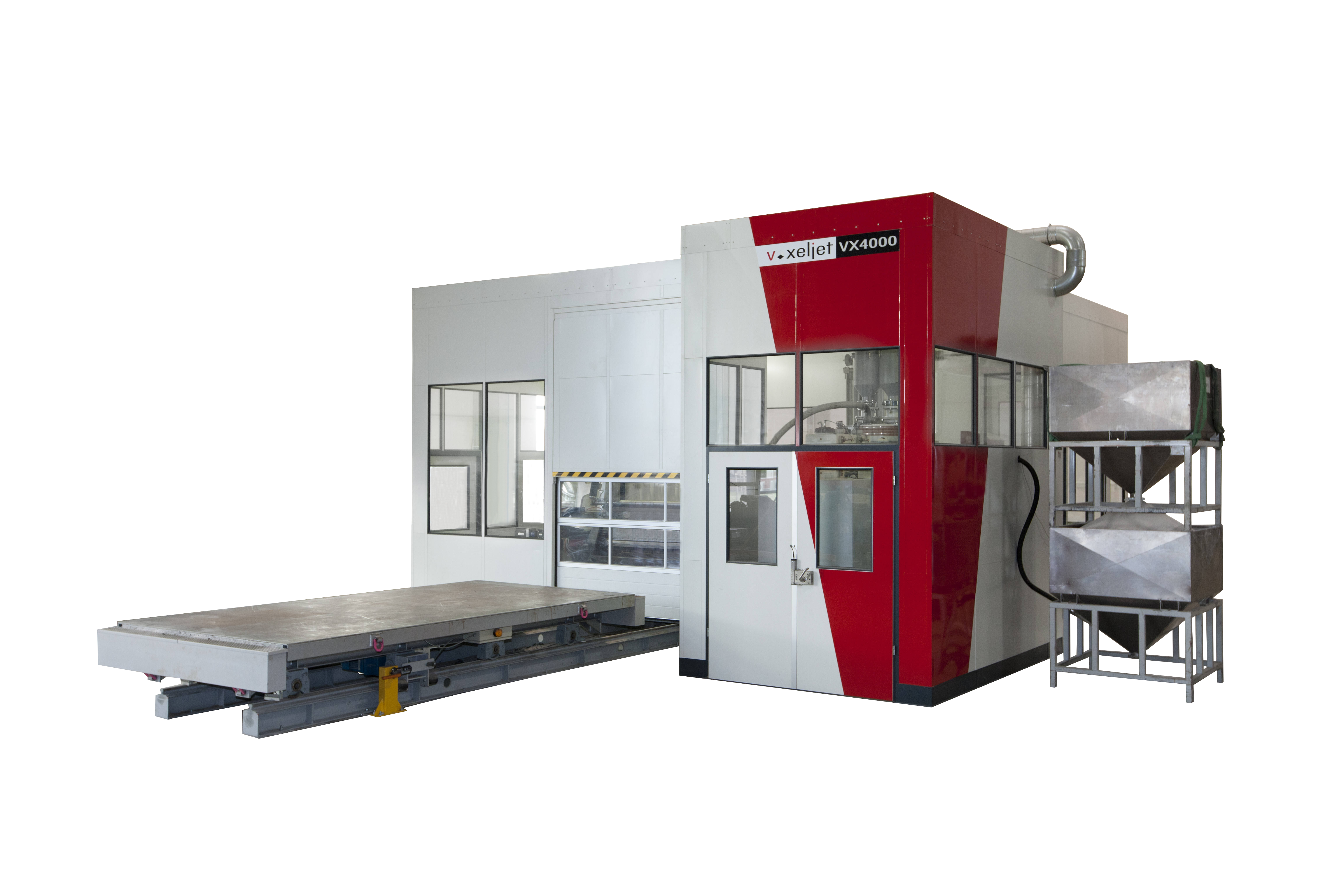 voxeljet 3D-Drucksystem VX4000